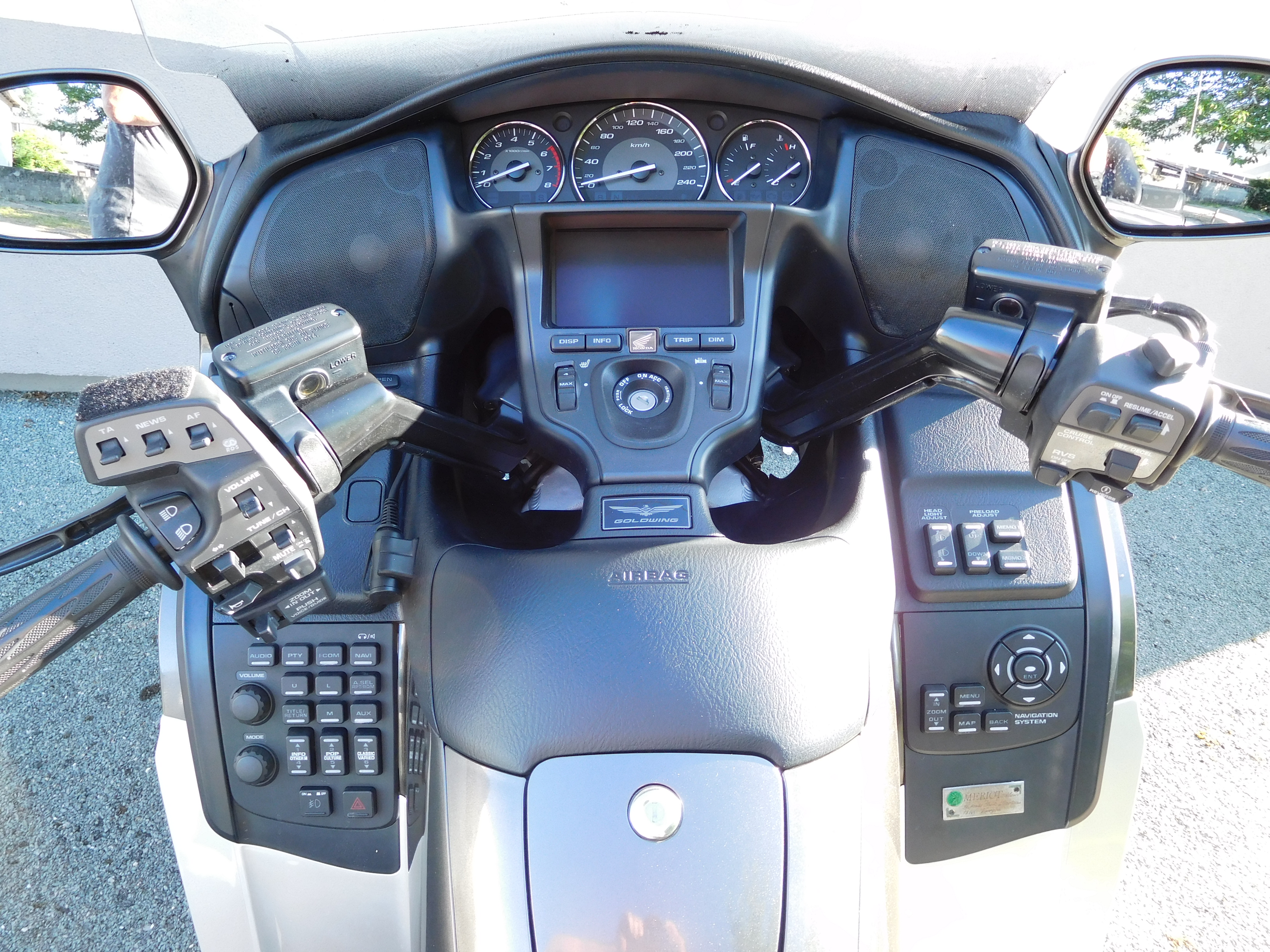 Honda Goldwing 1800 : tableau de bord.